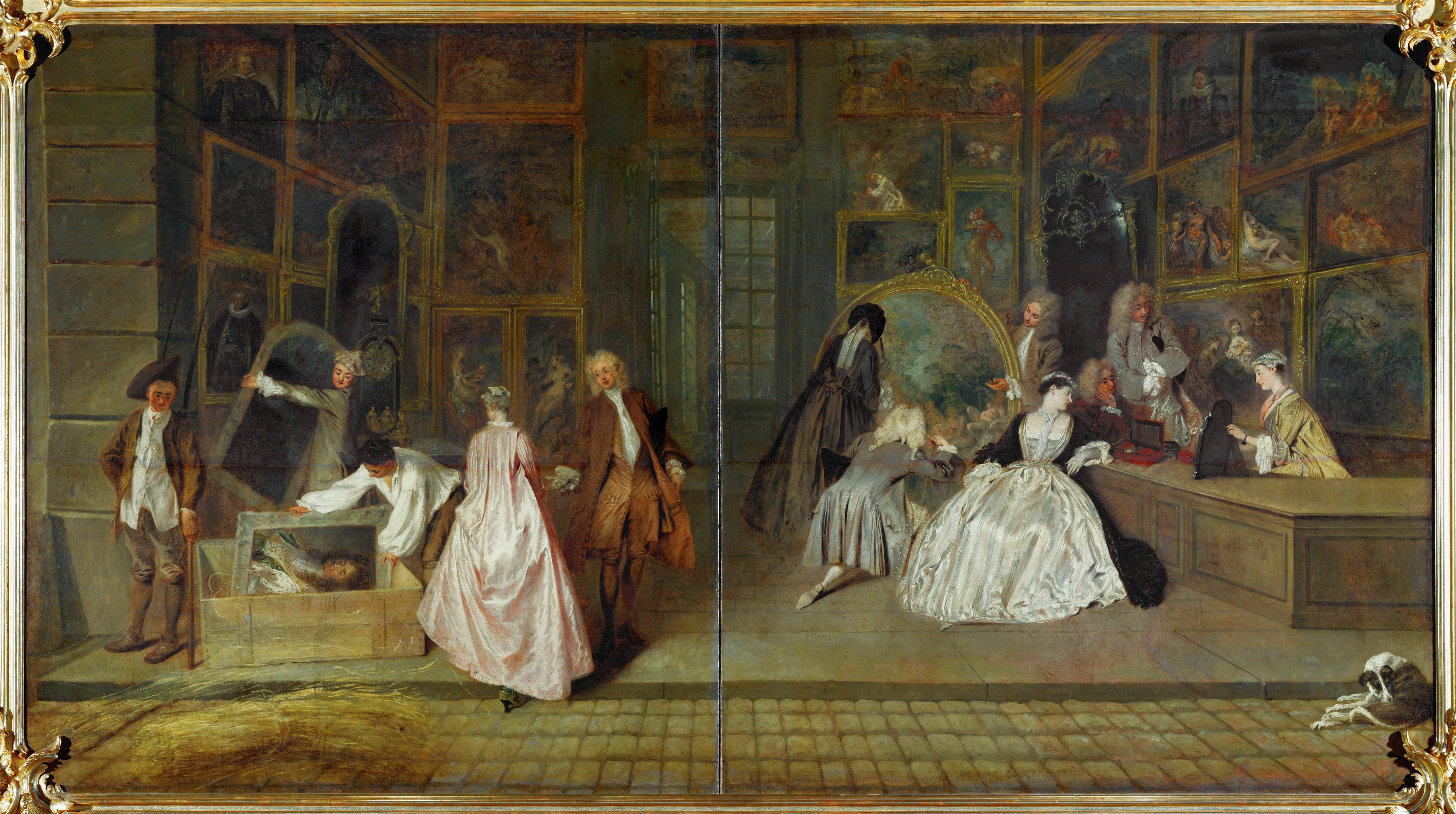 1,66*3,06m